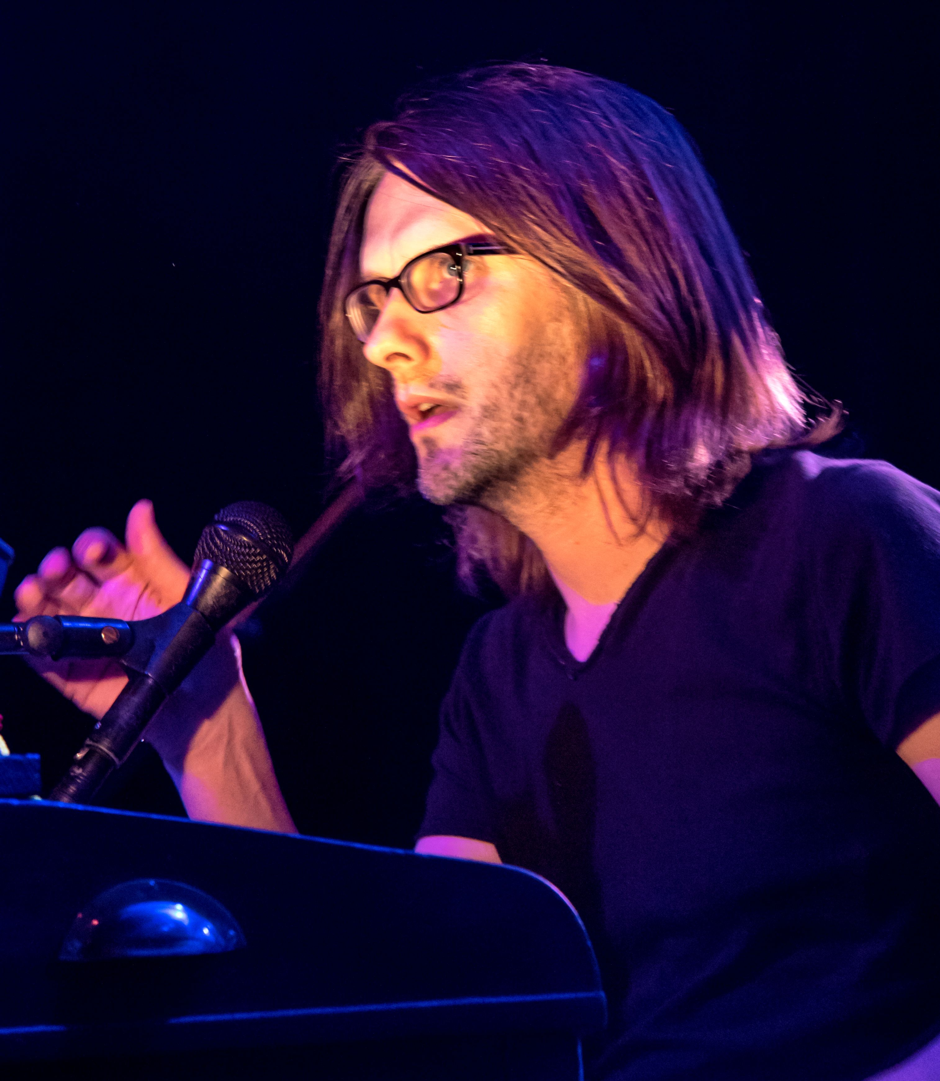 Bilder vom Zelt Musik Festival 2016 in Freiburg im Breisgau Steven Wilson